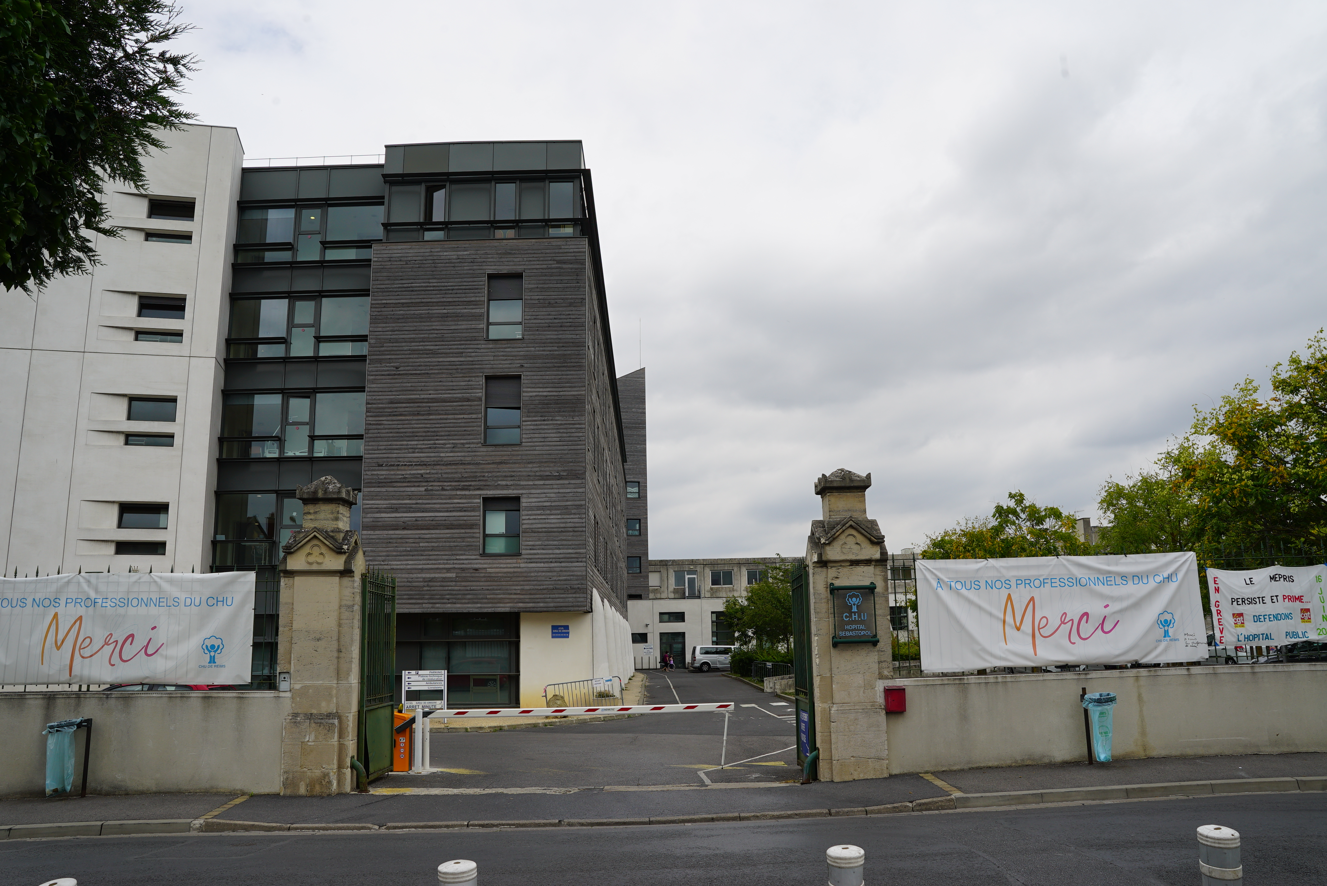 à Reims.